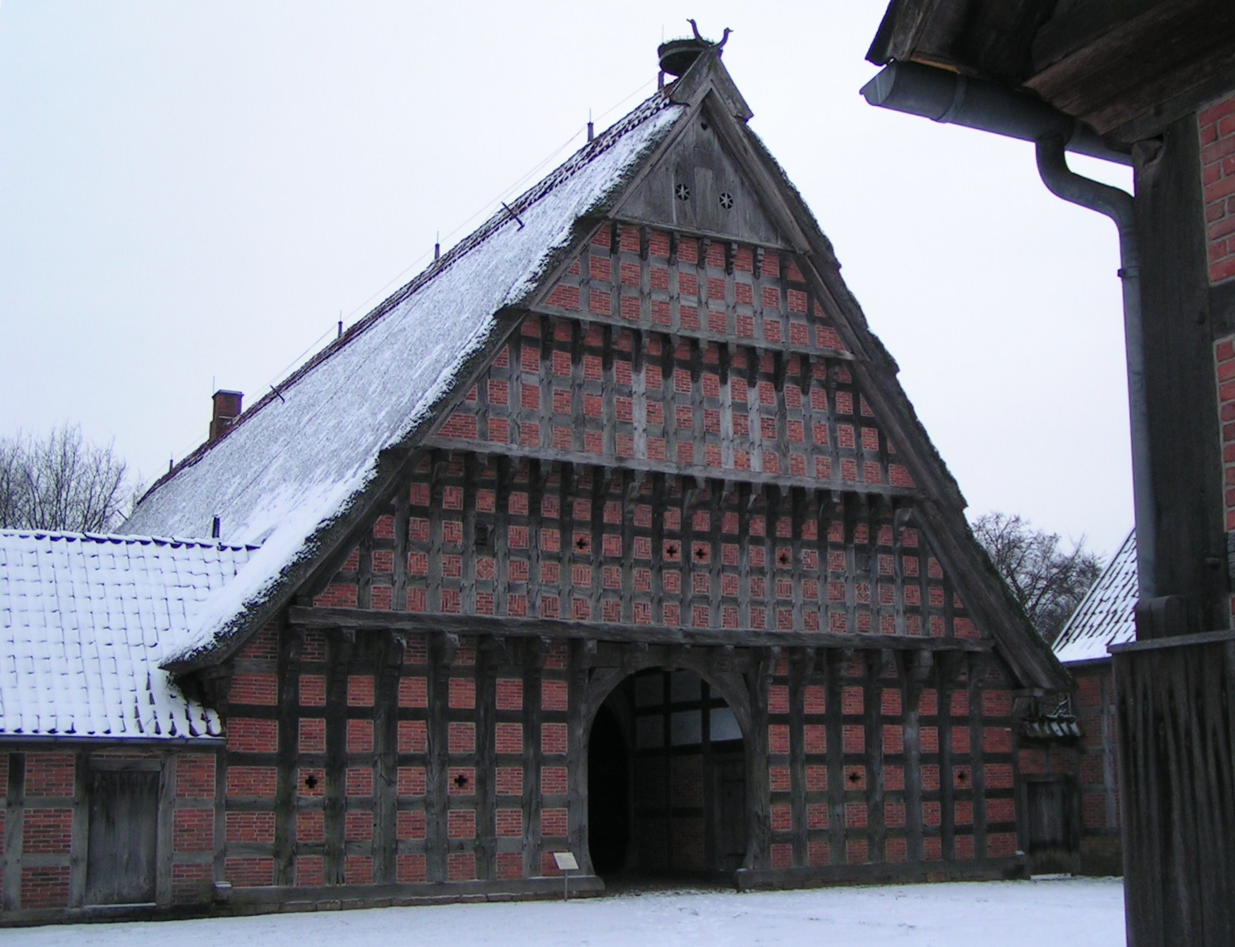 Wehlburg (Artländer Hof aus Wehdel) im Museumsdorf Cloppenburg, erbaut 1750